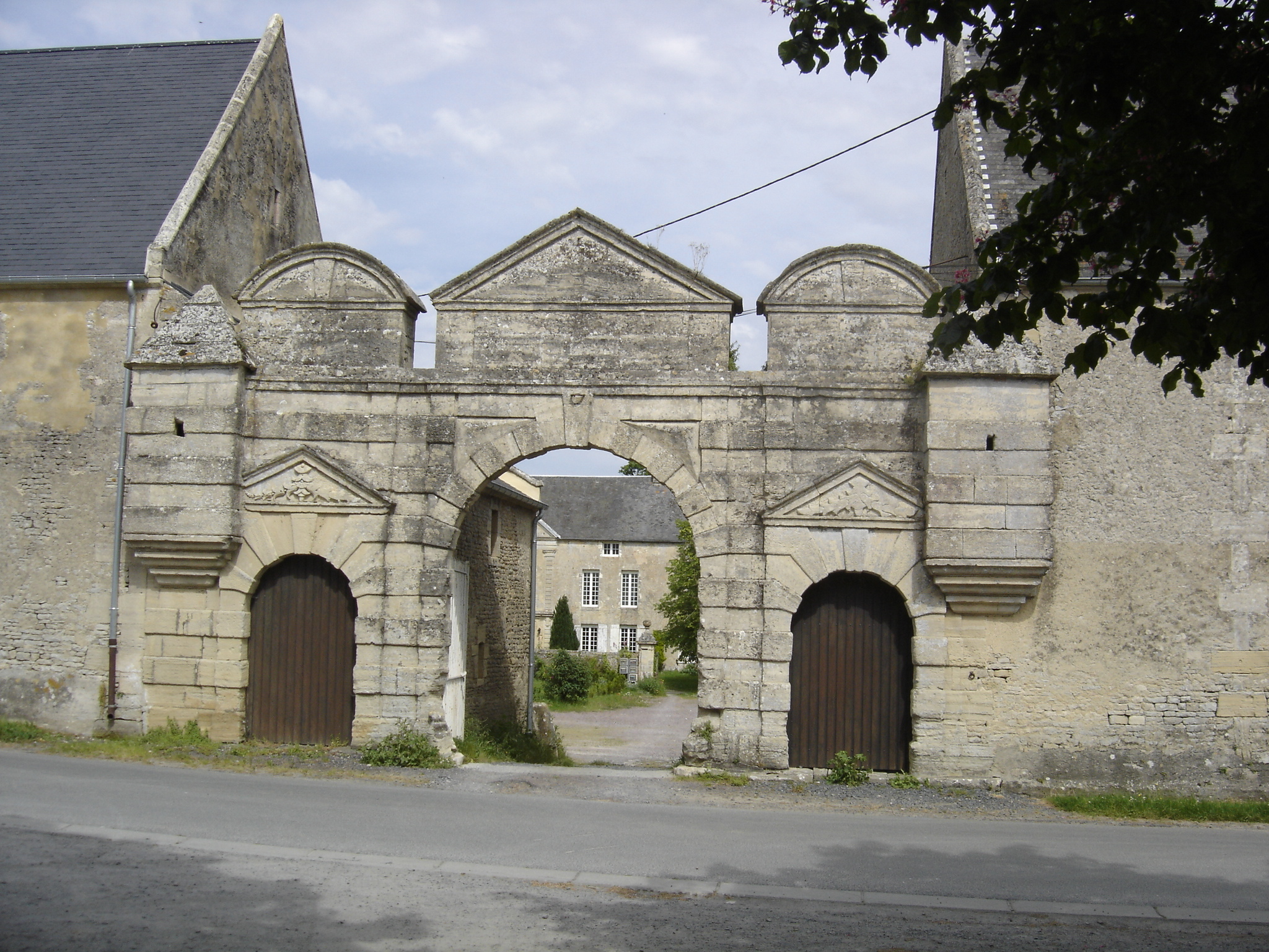 A Villiers le Sec, portail du château de Banville , construit sous le règne d'Henri IV. Ce porche pourvu d'une porte charretière et de deux portes piétonnes est flanqué de deux échauguettes